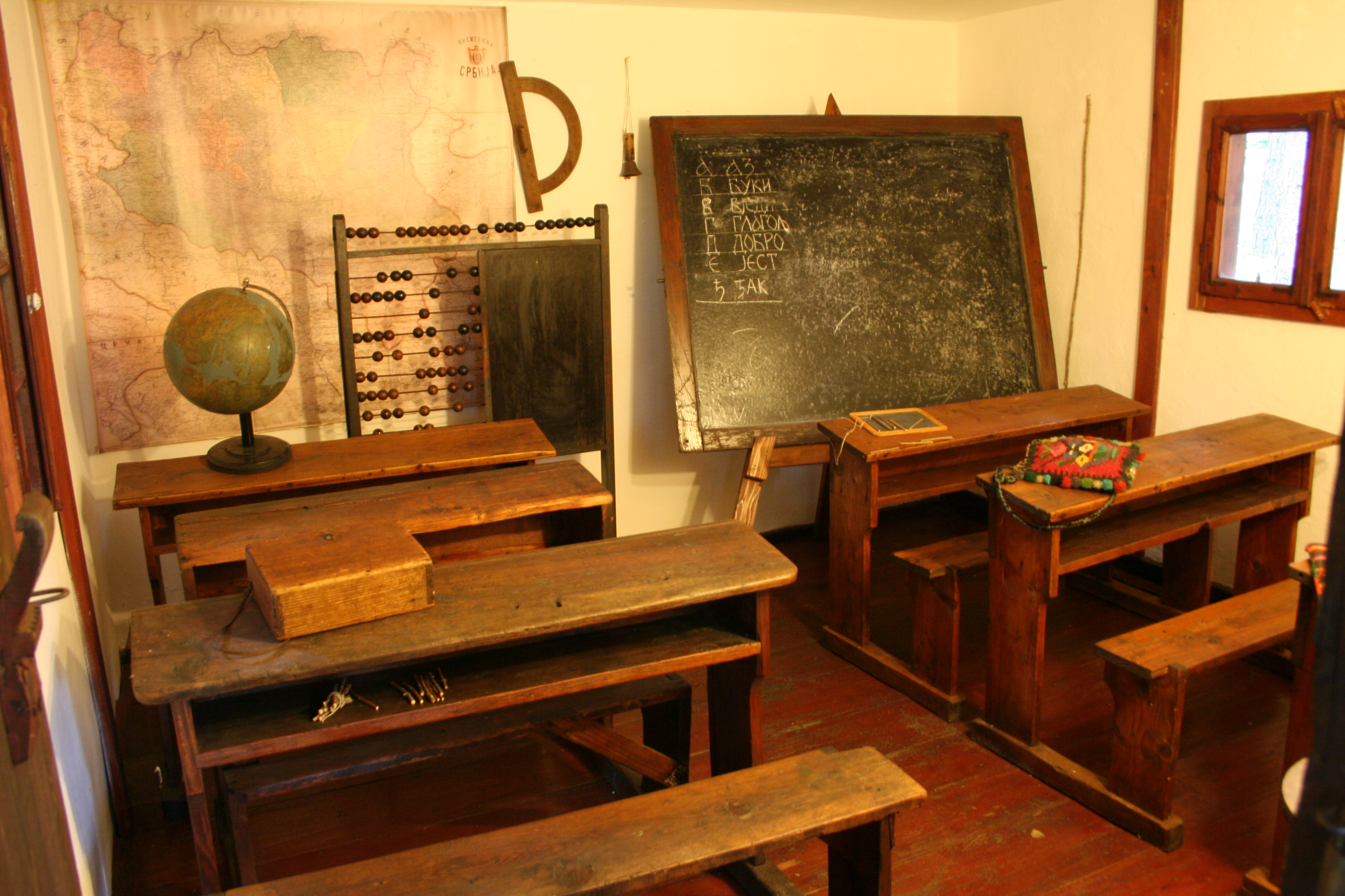 Muzej "Staro selo" Sirogojno